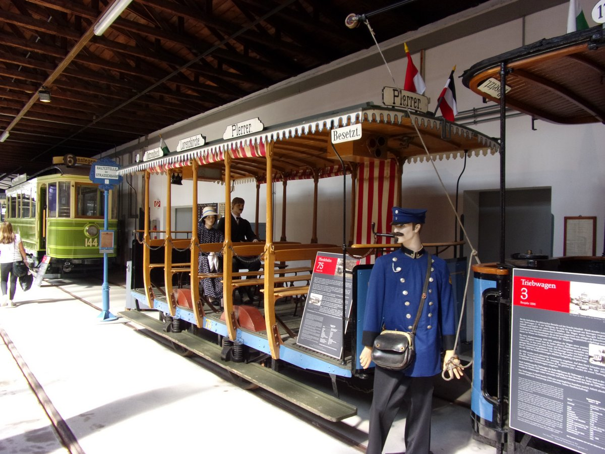 Nürnberger Pferdebahn-Sommerwagen 75